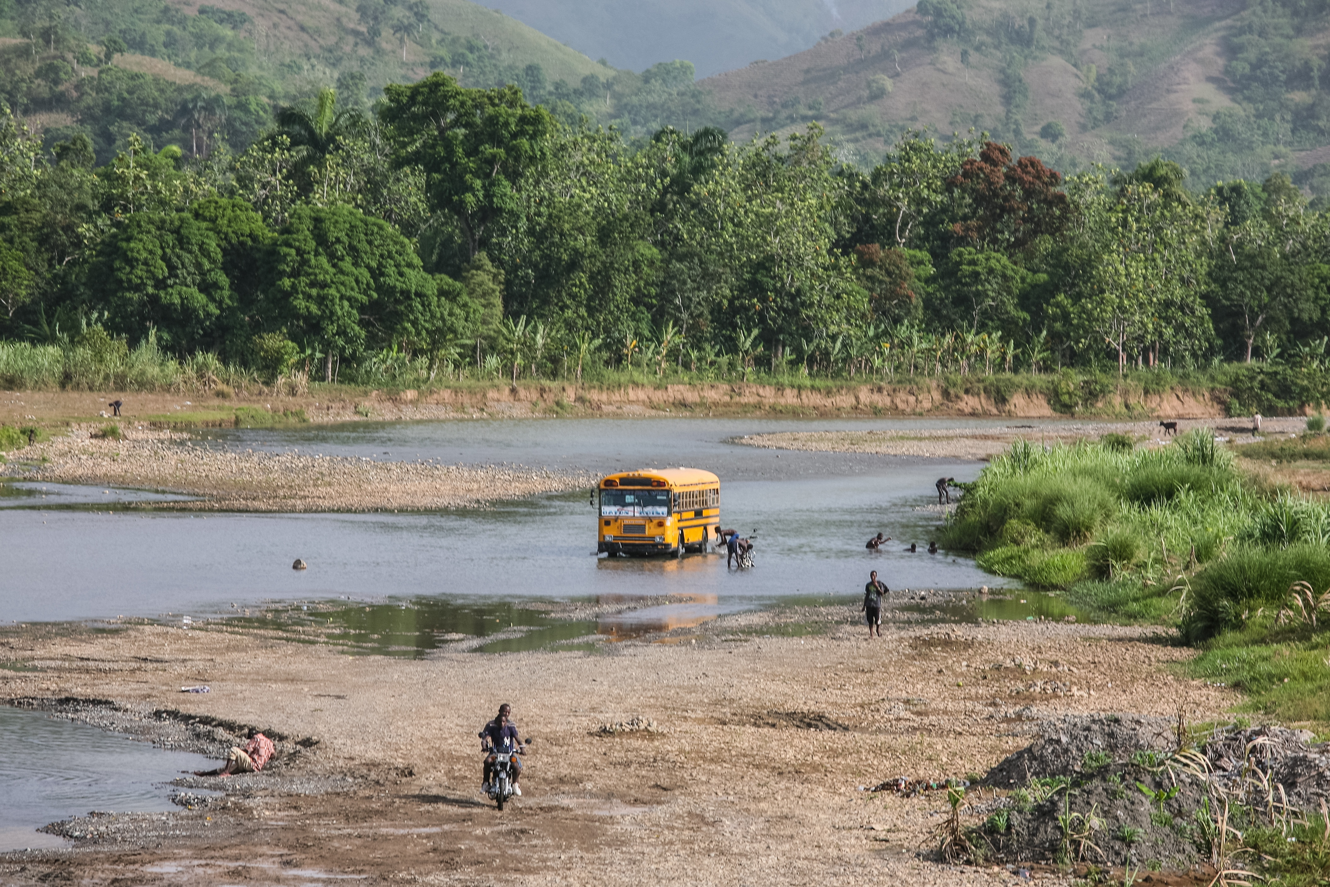 Nettoyage d'un bus scolaire sur le fleuve Trois Rivière à Haïti. (A school bus in a river in Haiti)